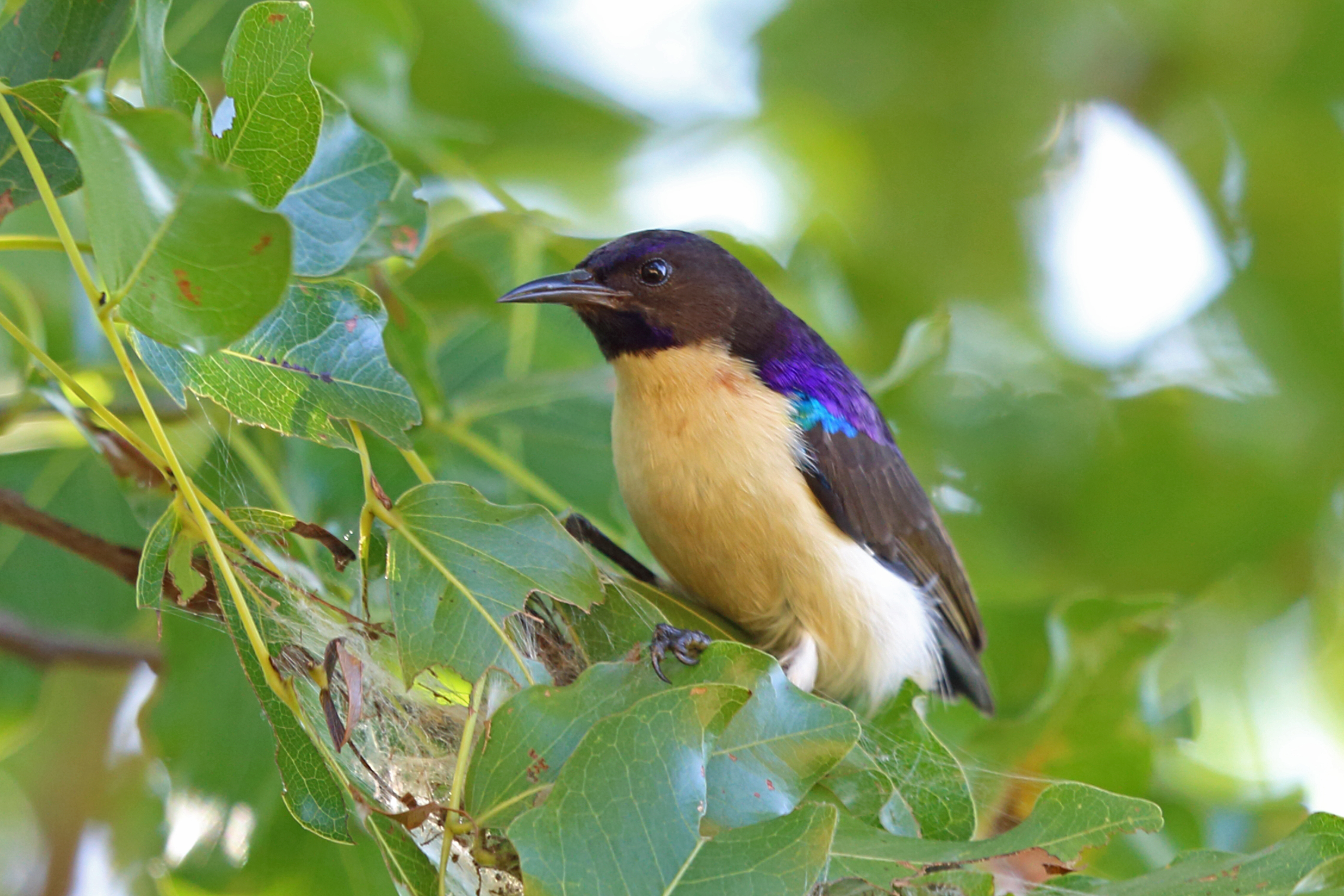 Male